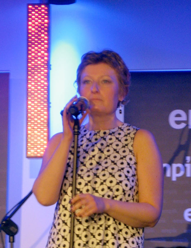 Koncert-wspomnienie z okazji imienin śp. Jacka Skubikowskiego w Salonie Empik Junior w Warszawie (17 marca 2008). Na zdjęciu: Beata Molak.